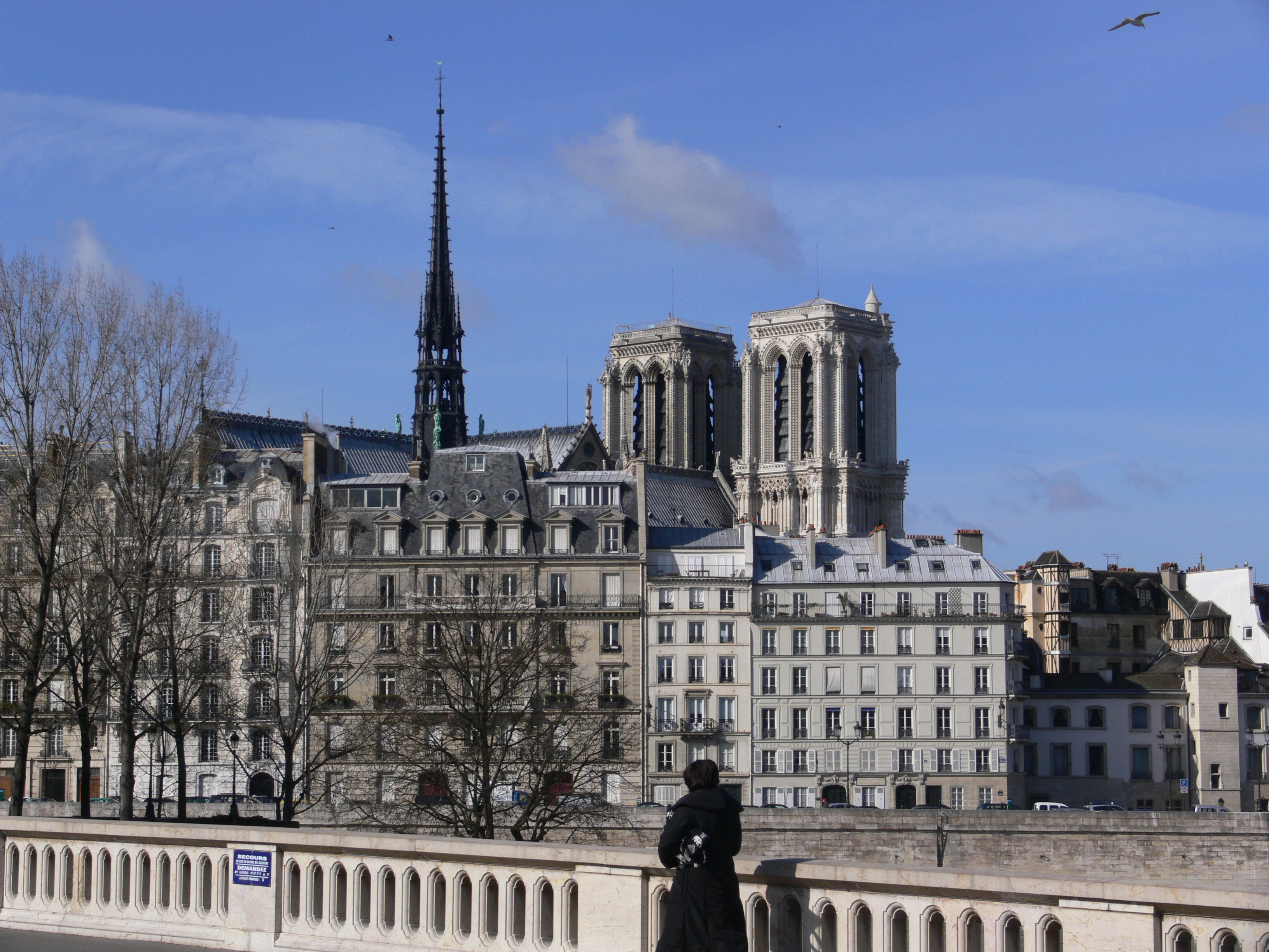 L'île de la Cité, avec la Cathédrale Notre-Dame de Paris, vu du pont Louis-Philippe